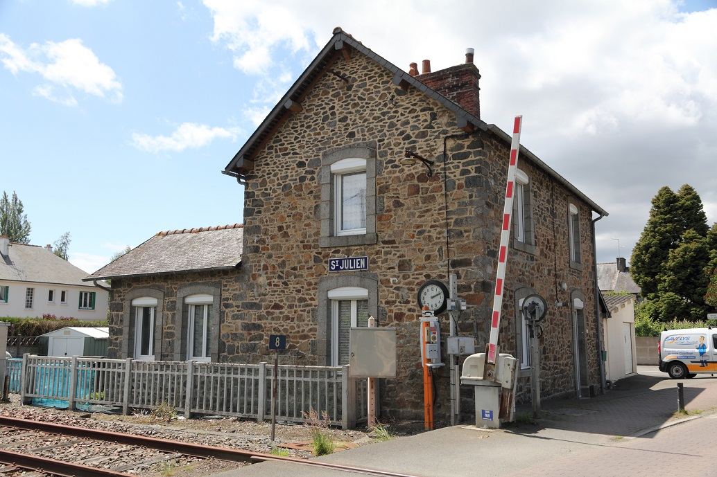 Vue de l'ancien bâtiment-voyageurs (également maison de PN) de la gare de Saint-Julien (Côtes d'Armor) en juin 2012, Bretagne, France.